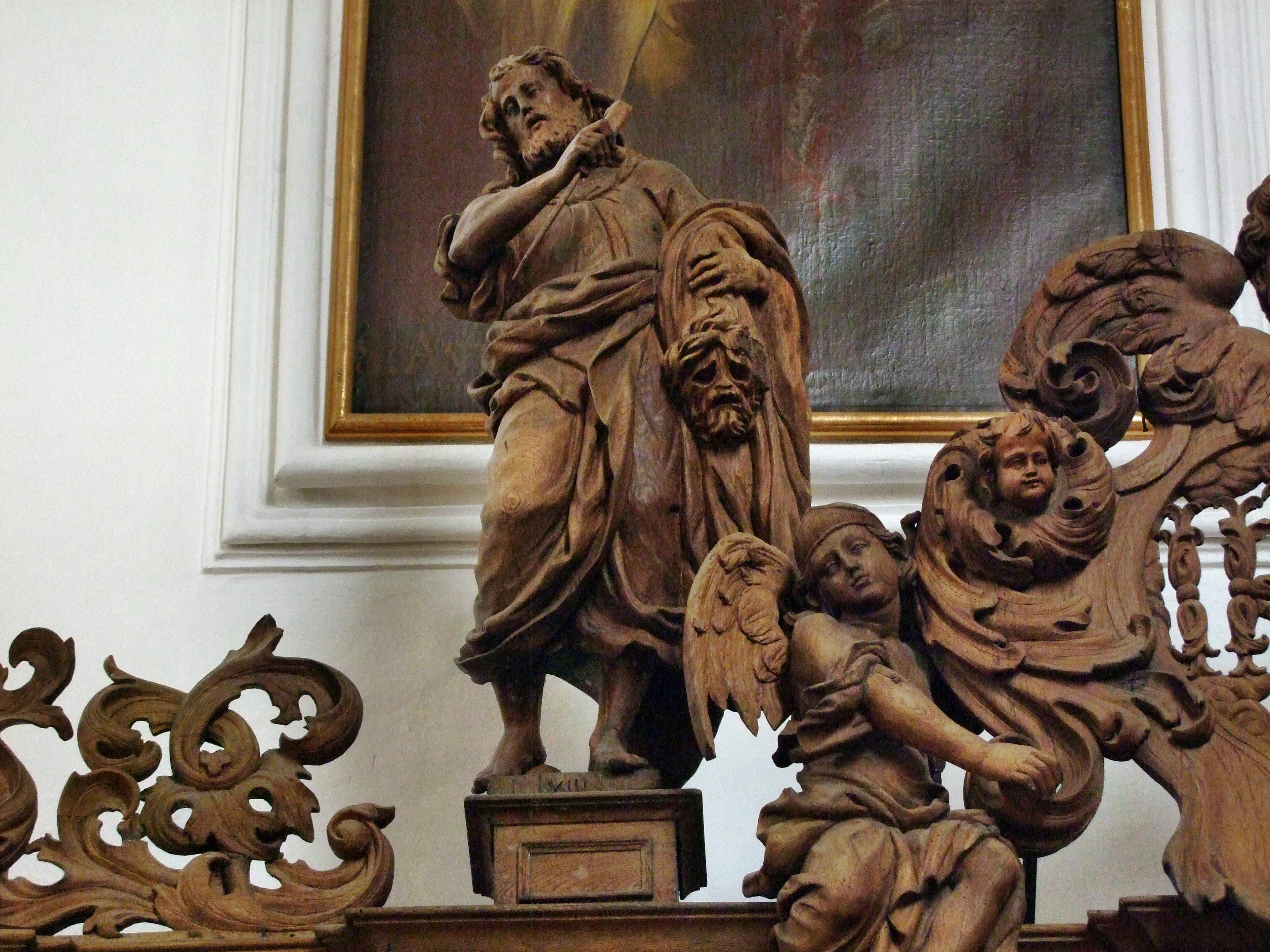 Chorgestühl in der ehemaligen Klosterkirche der Kartause in Buxheim bei Memmingen